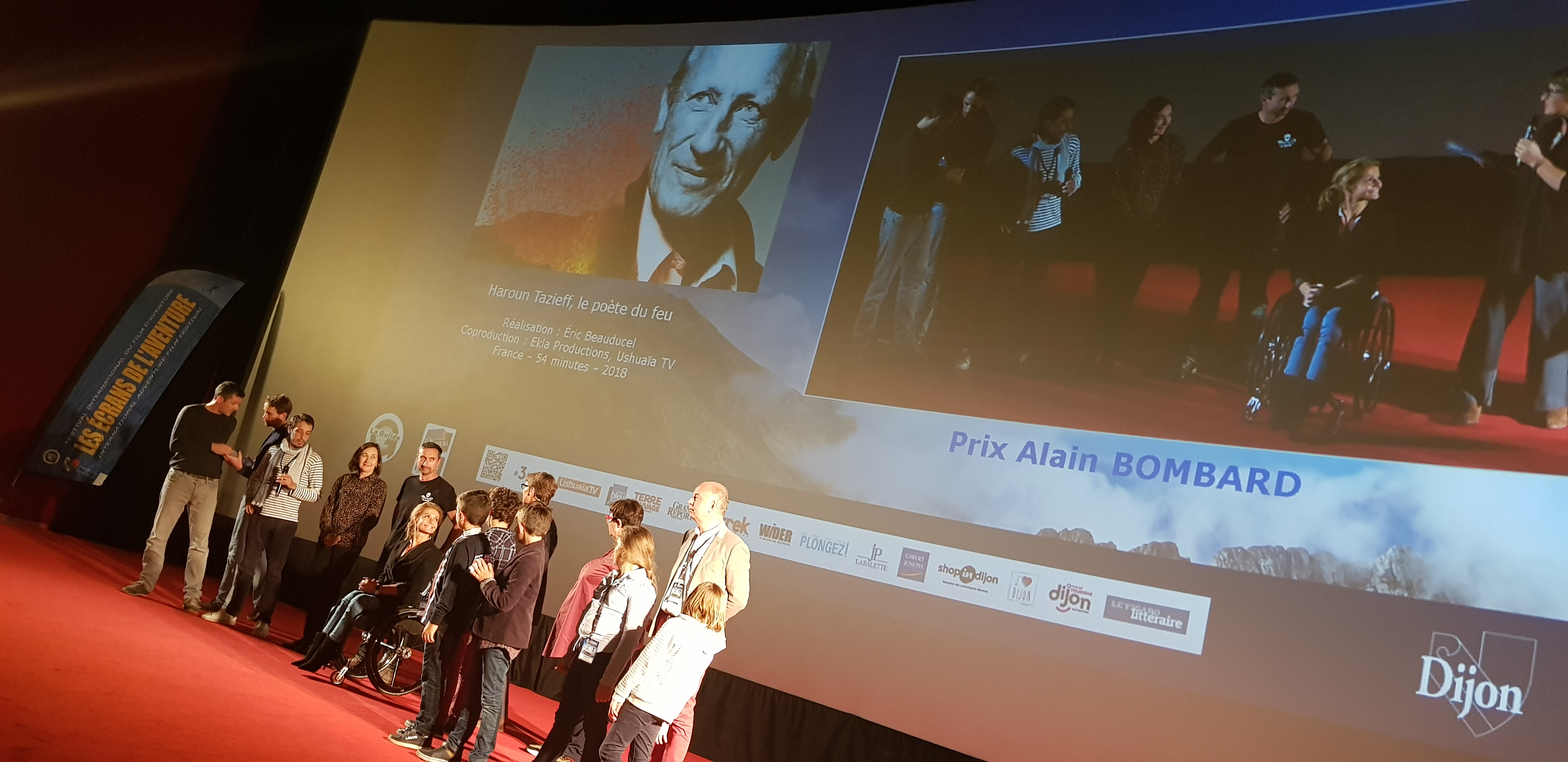 Festival International du Film d'Aventure de Dijon, Prix Alain Bombard 2019 remis à Éric Beauducel pour son film « Haroun Tazieff : Le poète du feu ».